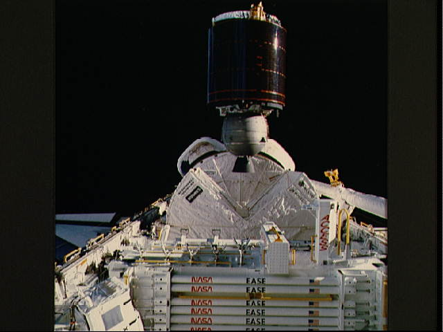 despliegue del satelite morelos II